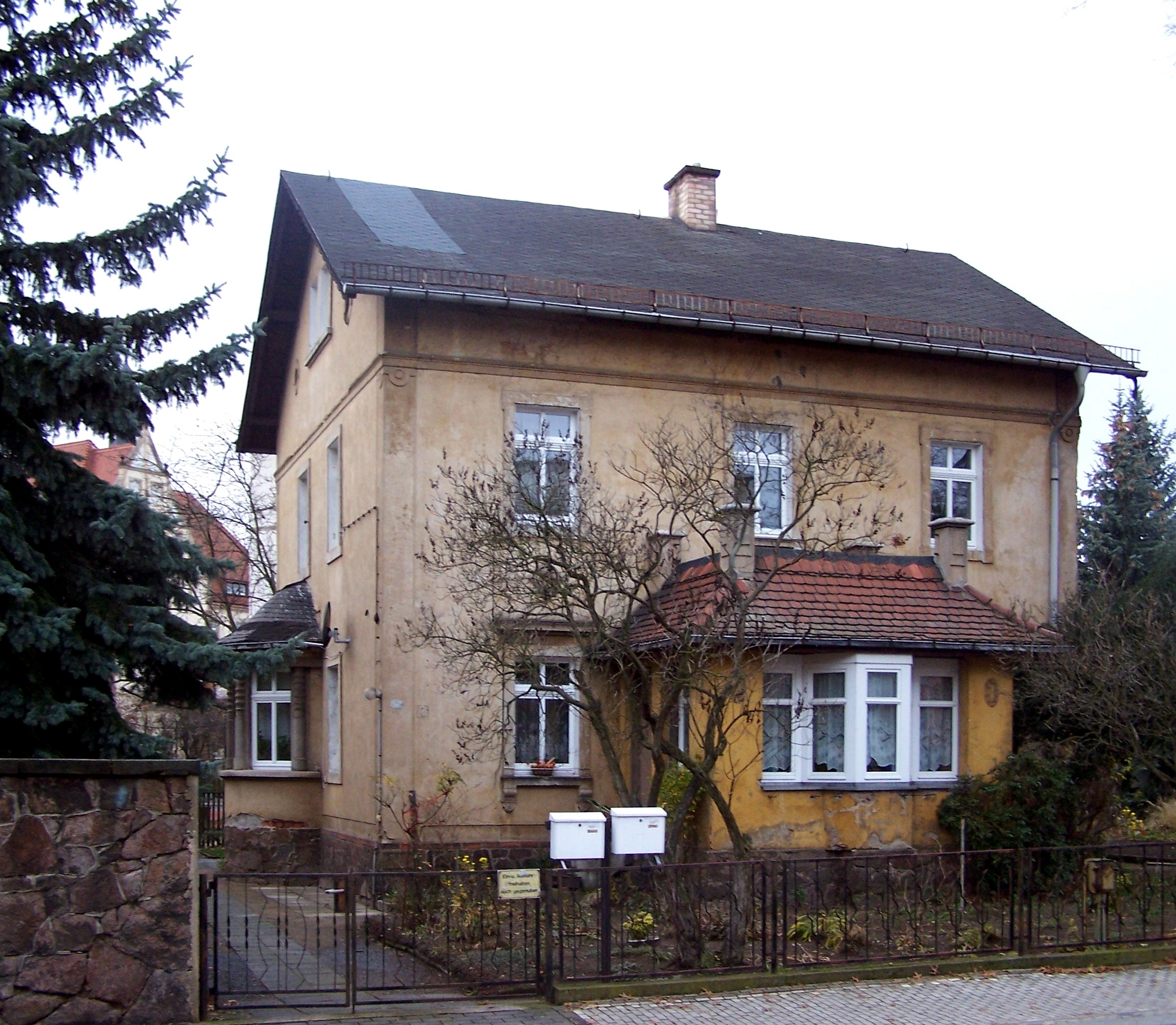 Gellertstr. 2 in Radebeul